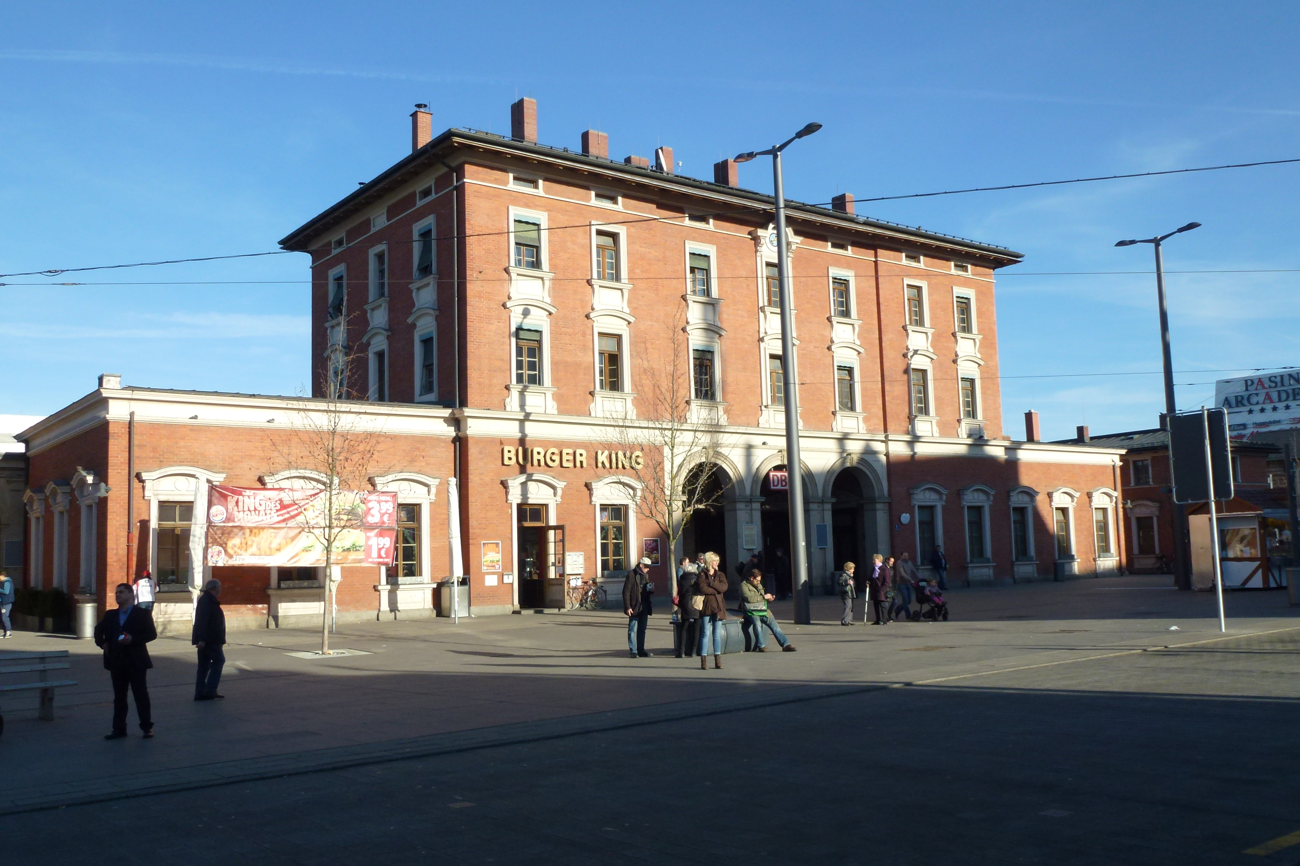 Empfangsgebäude des Bahnhofs München-Pasing